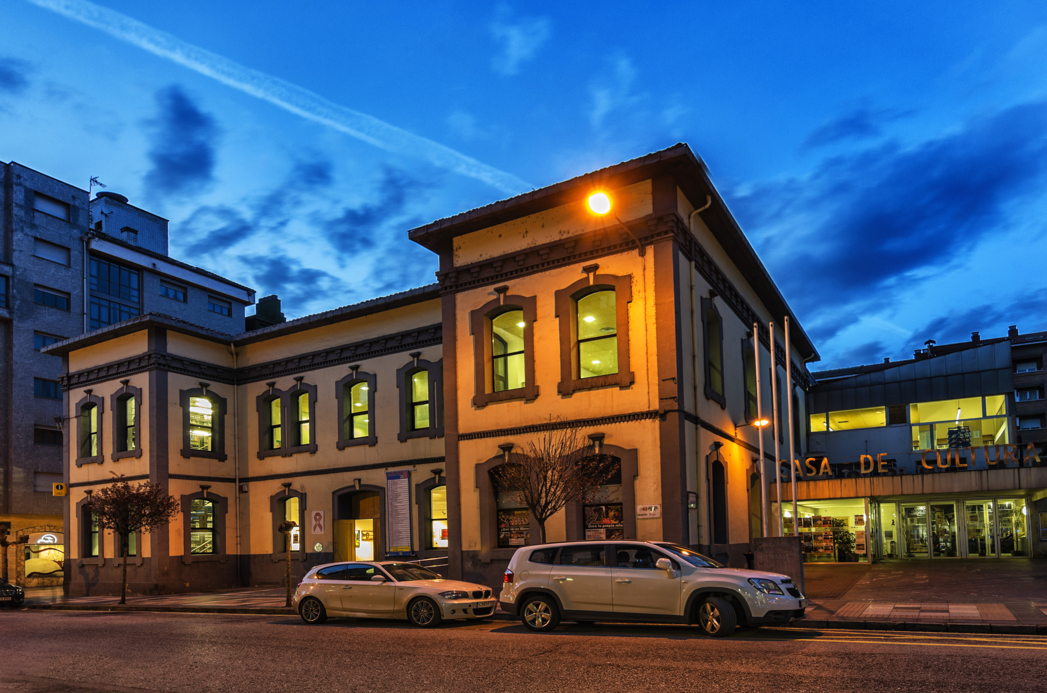 Casa de Cultura. Biblioteca, Mieres